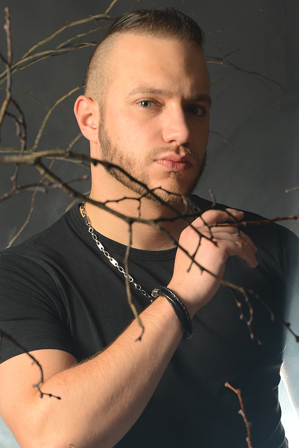 Foto von Silizium.